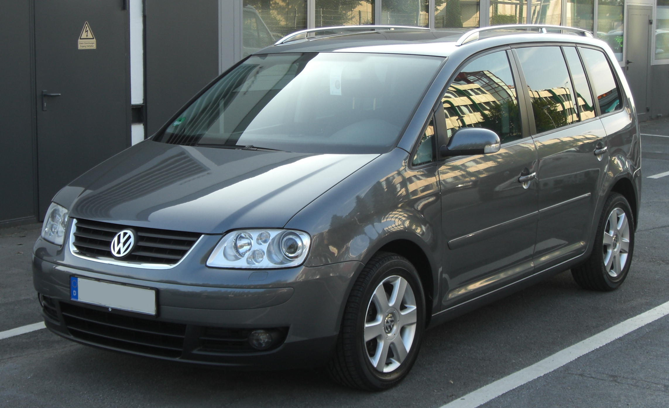 VW Touran